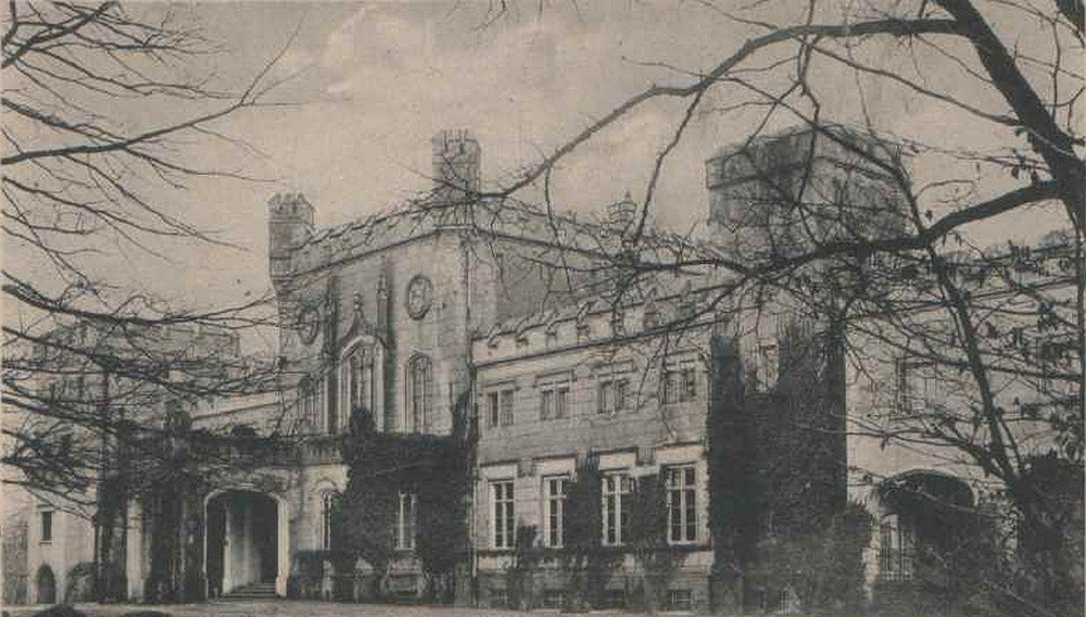 Pałac Radolińskich w Jarocinie. Widok frontowej strony pałacu. Przełom XIX i XX wieku.